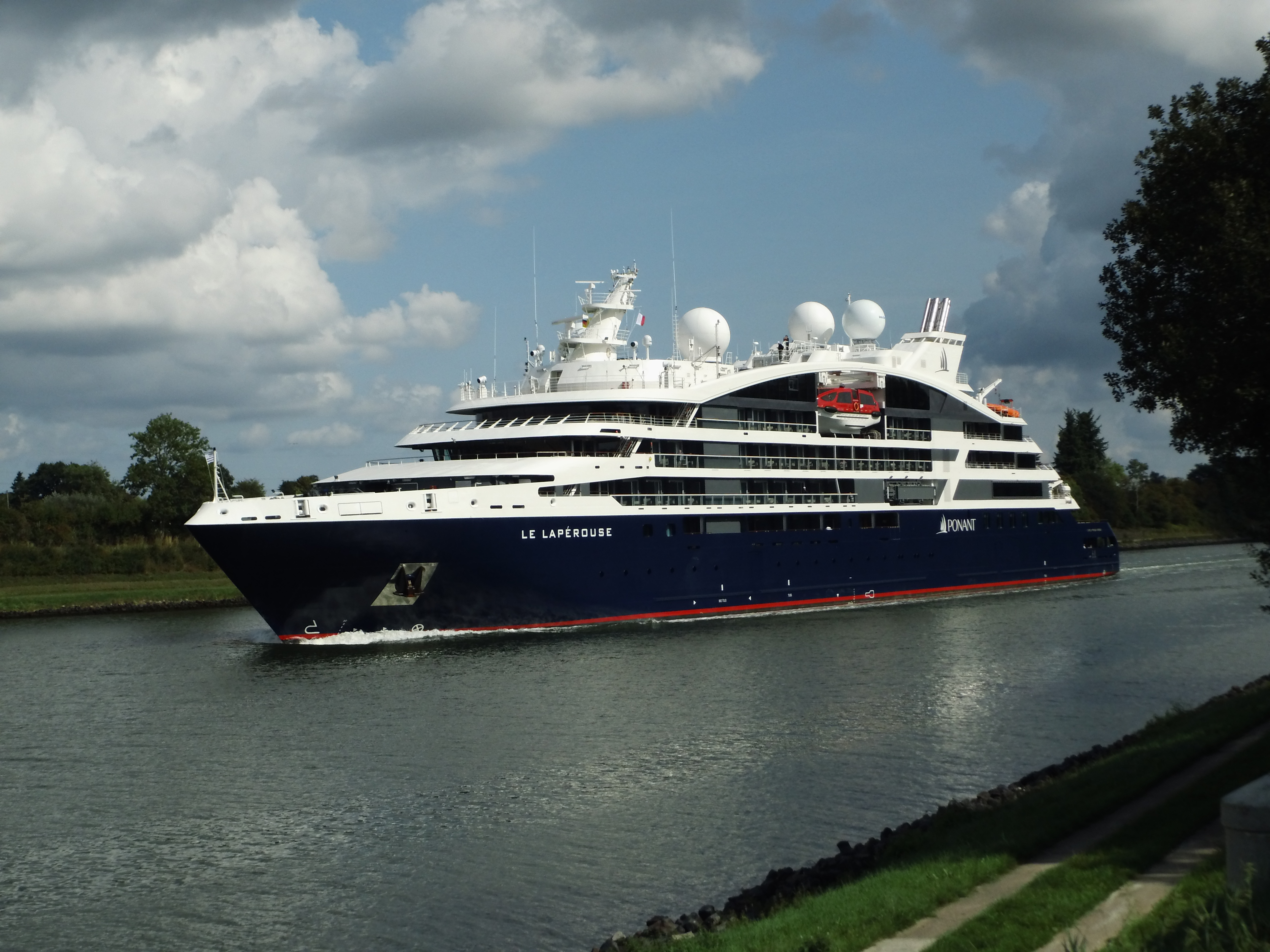 Le Lapérouse in the Kiel Canal - Königsförde